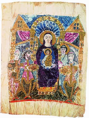 Поклонение волхвов. Миниатюра из Эчмиадзинского Евангелия. VI–VII вв. (Матен. 2374)